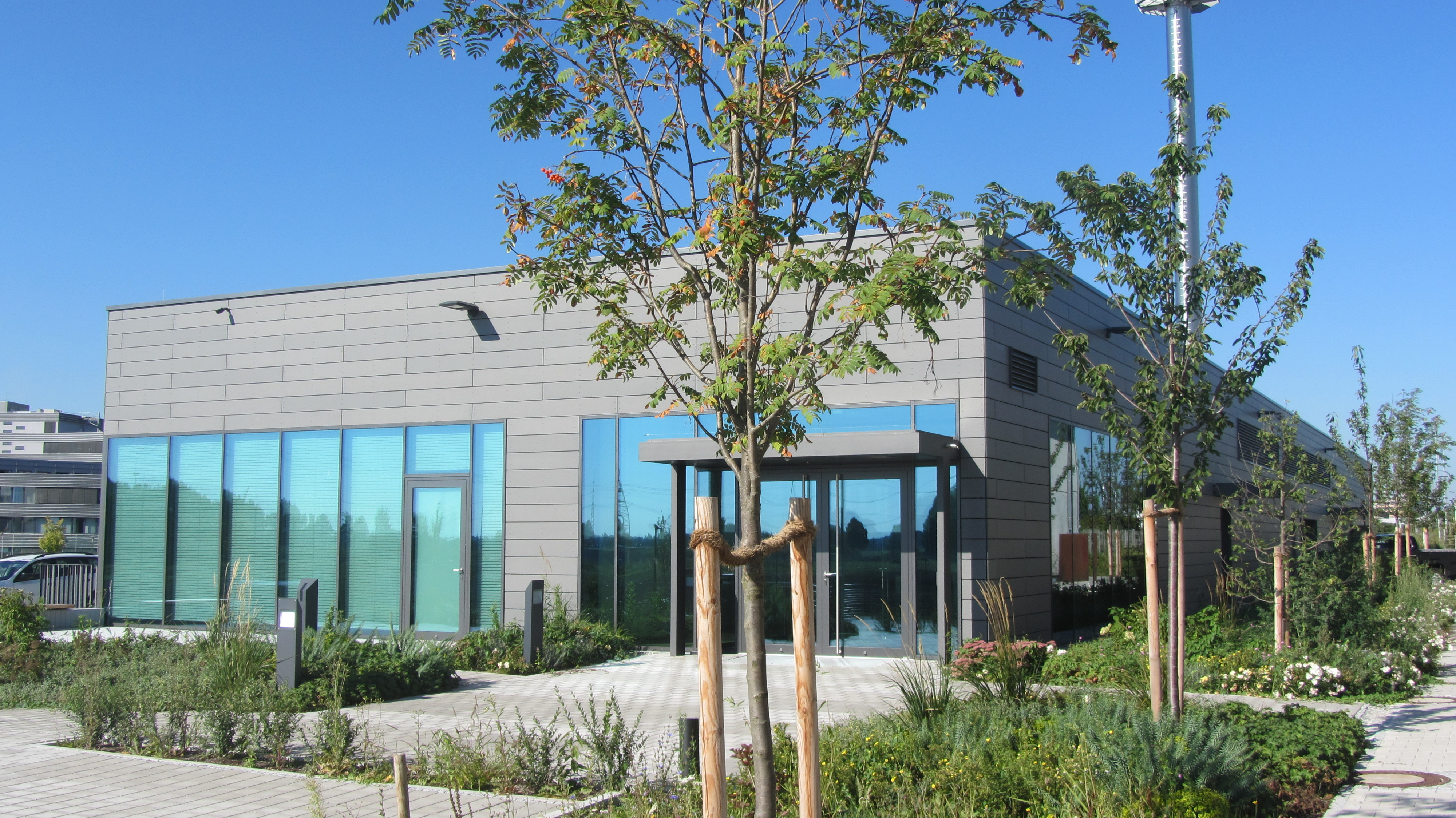 Energieznetrale II der Goethermieanlage Unterföhring